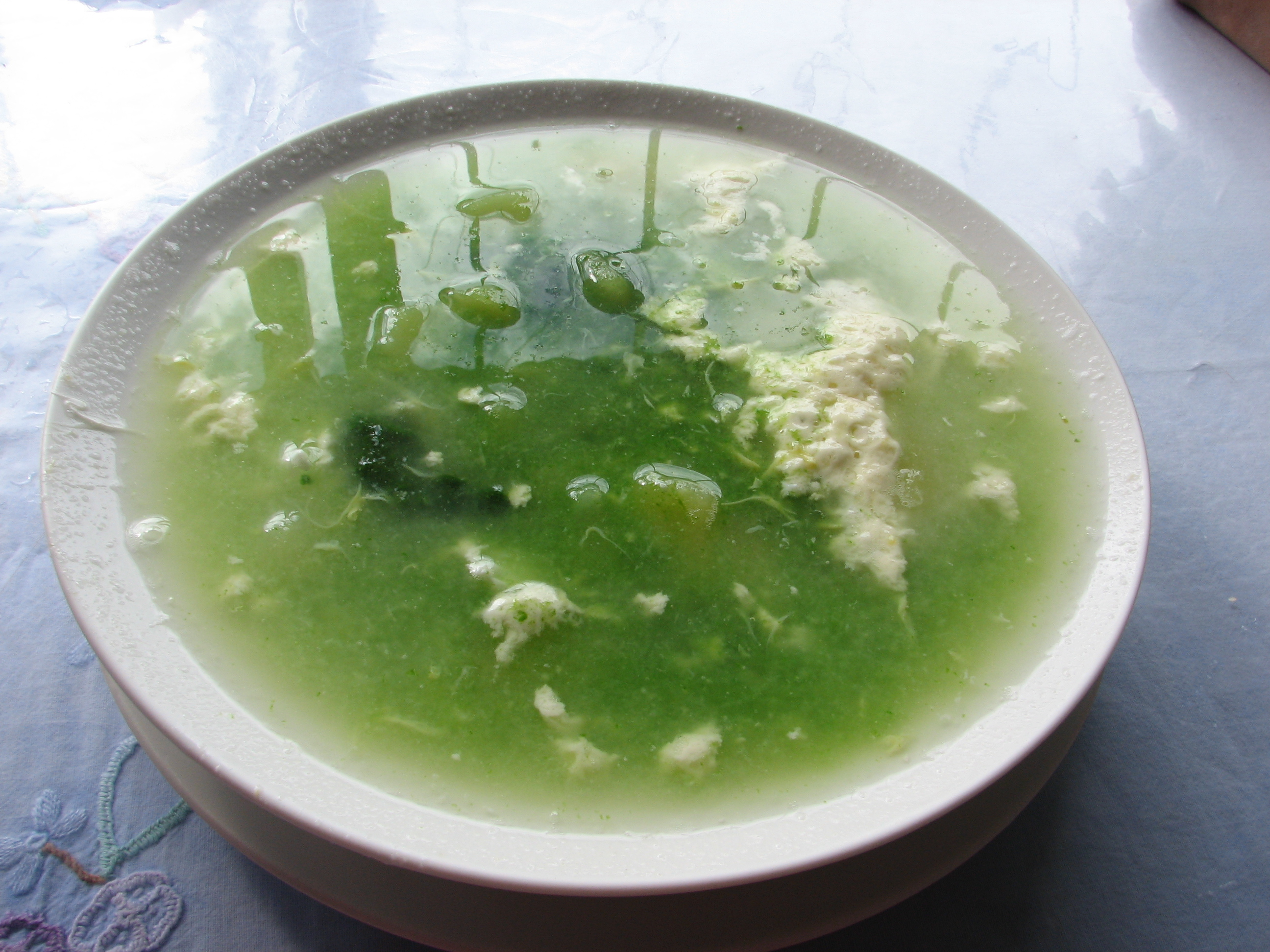 Soup, Caldo verde, Peru.